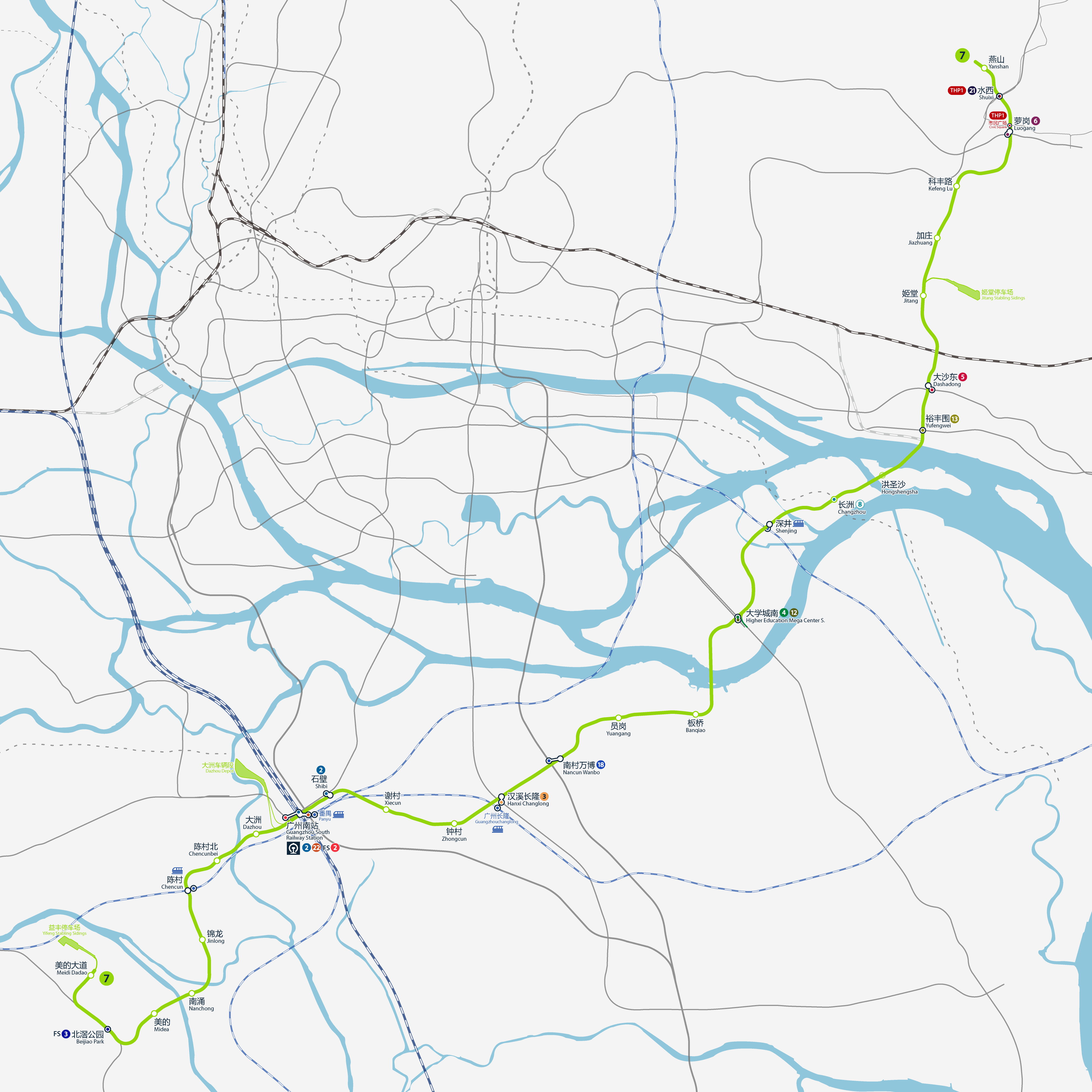 廣州地鐵7號線路線圖（在建），按真實走向比例繪畫